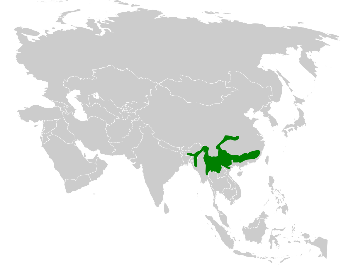 Paradoxornis guttaticollis distribution map